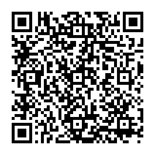 Enlace QR a Facebook CIP Oficial